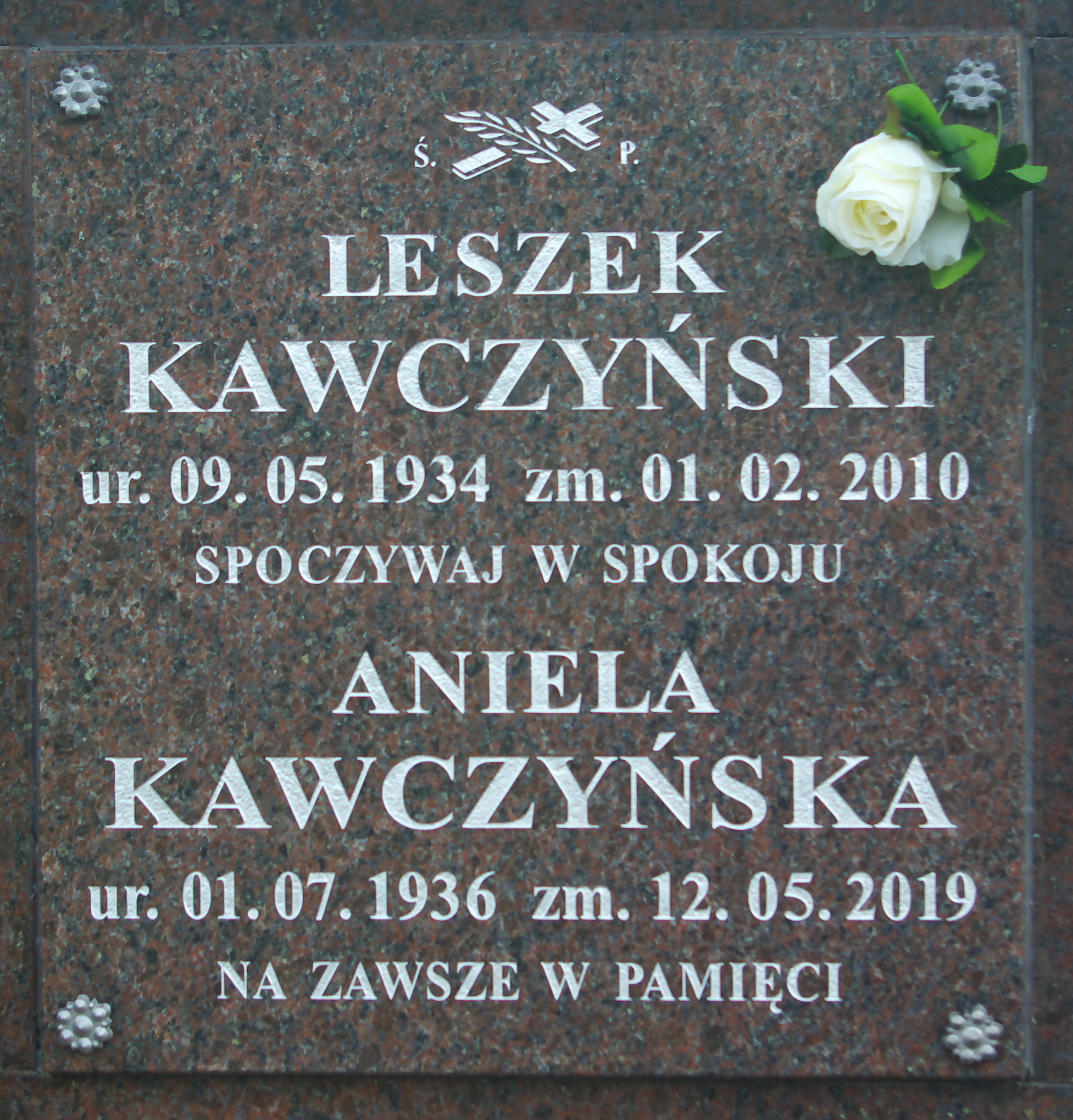 Miejsce pochówku prochów Leszka i Anieli Kawczyńskich na Cmentarzu Centralnym w Sanoku (kolumbarium).